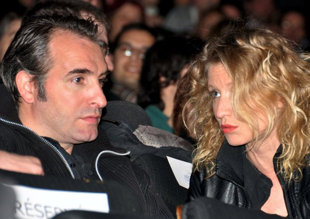 Jean Dujardin et Alexandra Lamy à l'avant-première du film Le Mac